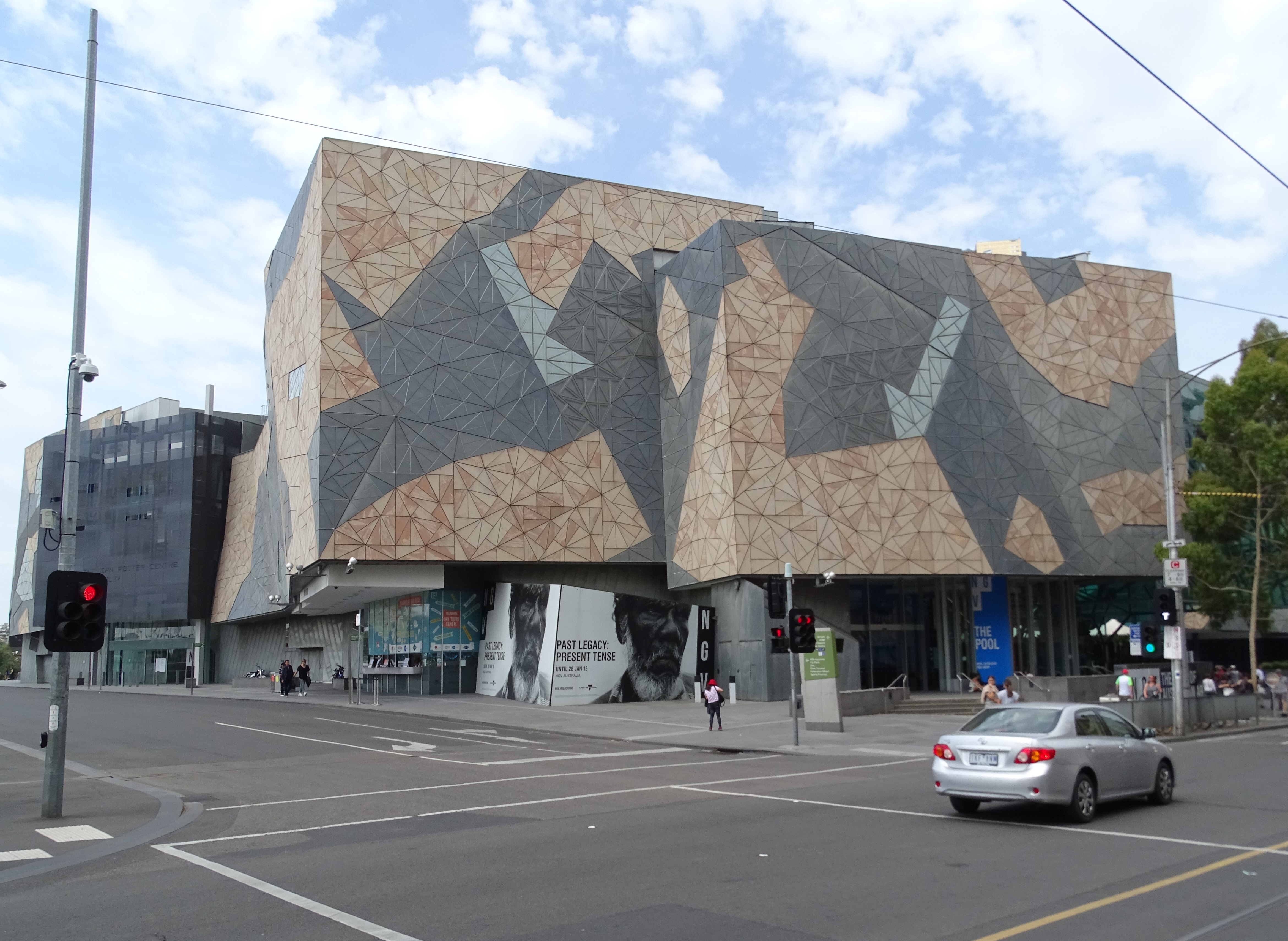 Ian Potter centre, Federation Square, Melbourne